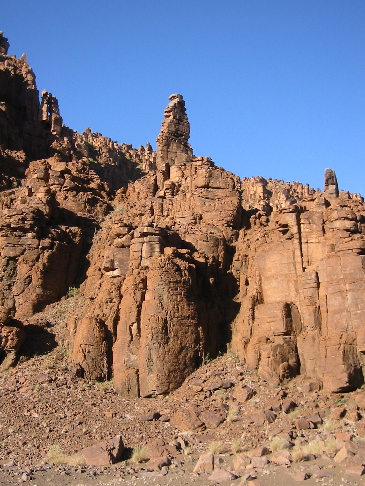 Namibian Canyon